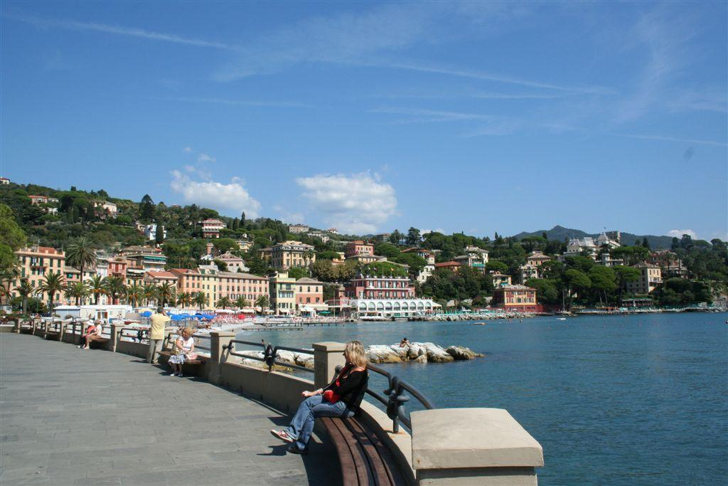 Lungomare di Santa Margherita Ligure, Liguria, Italia